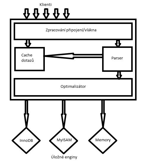 Schéma architektury MySQL serveru